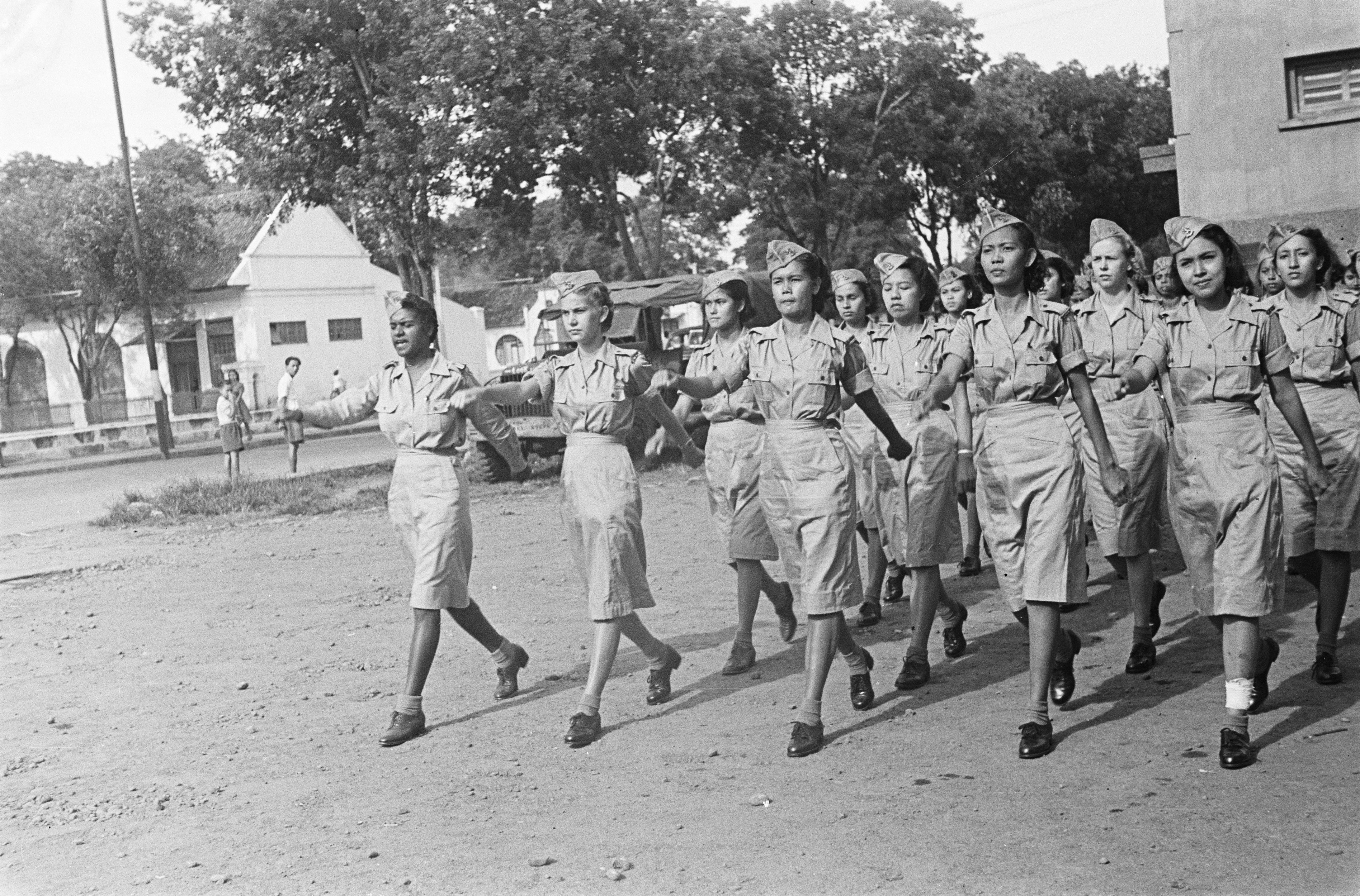 Collectie / Archief : Fotocollectie Dienst voor Legercontacten Indonesië Reportage / Serie : [DLC] Vrouwenkorps KNIL Beschrijving : [Eenheid van het vrouwenkorps marcheert] Datum : 19 maart 1948 Locatie : Batavia, Indonesië, Jakarta, Nederlands-Indië Fotograaf : Krieken, [...] van / DLC Auteursrechthebbende : Nationaal Archief Materiaalsoort : Negatief (zwart/wit) Nummer archiefinventaris : bekijk toegang 2.24.04.02 Bestanddeelnummer : 6674